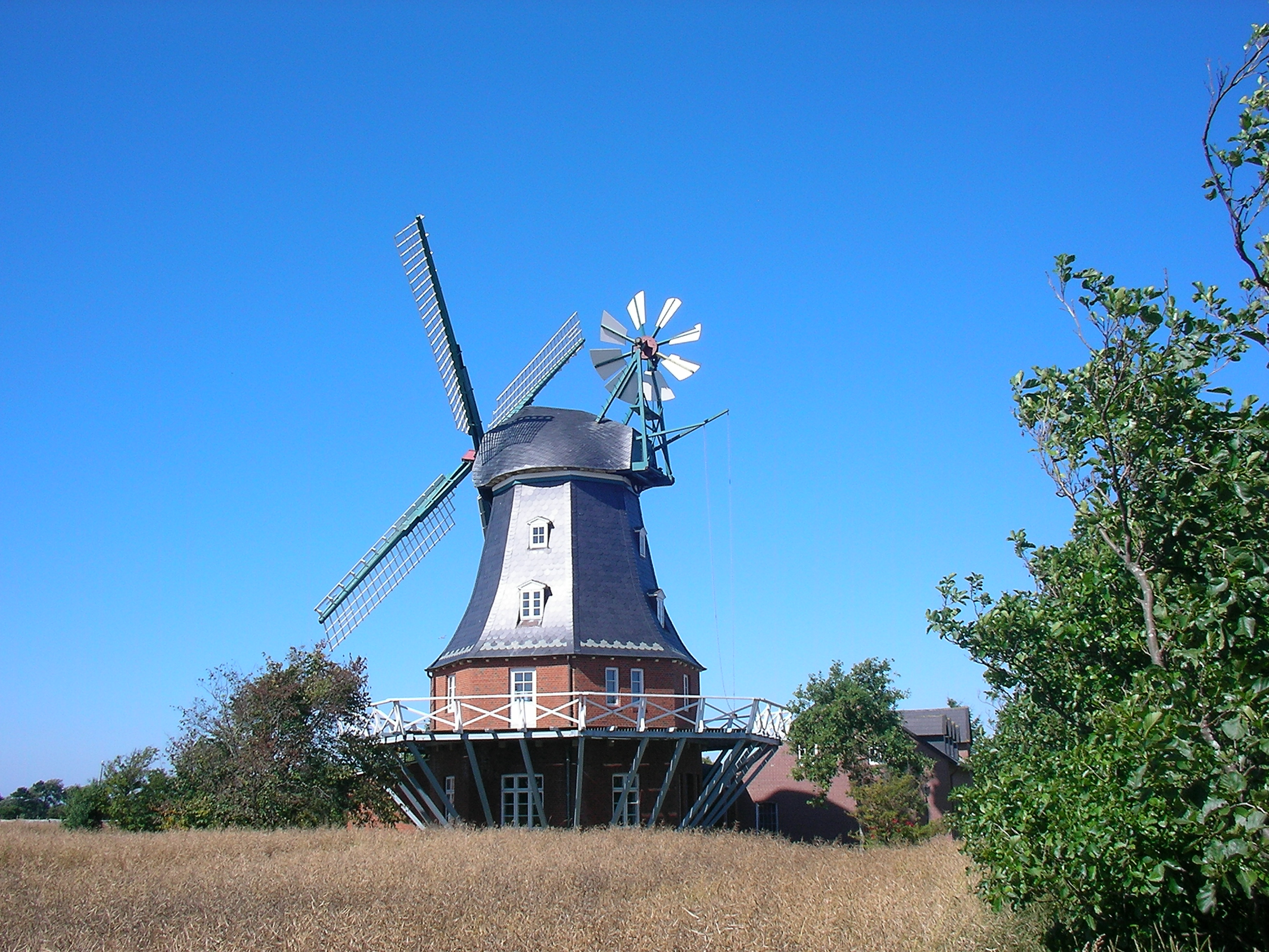 Borgsum